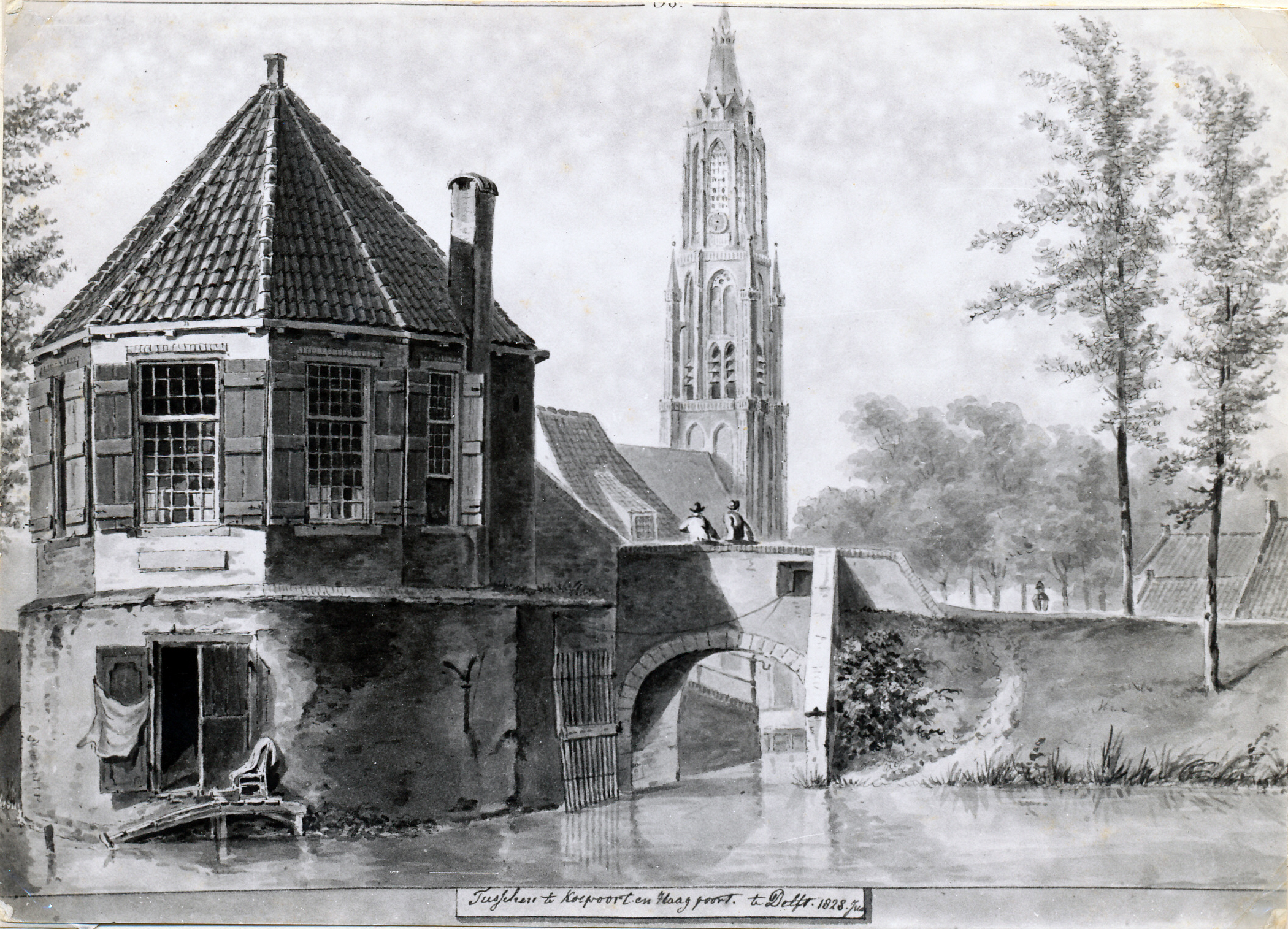 Aan de achterkant maakte hij een deur boven het water met een vlondertje waarop je heel goed op een stoel kon zitten, zoals de tekening van Balthasar Jooss uit 1828. laat zien